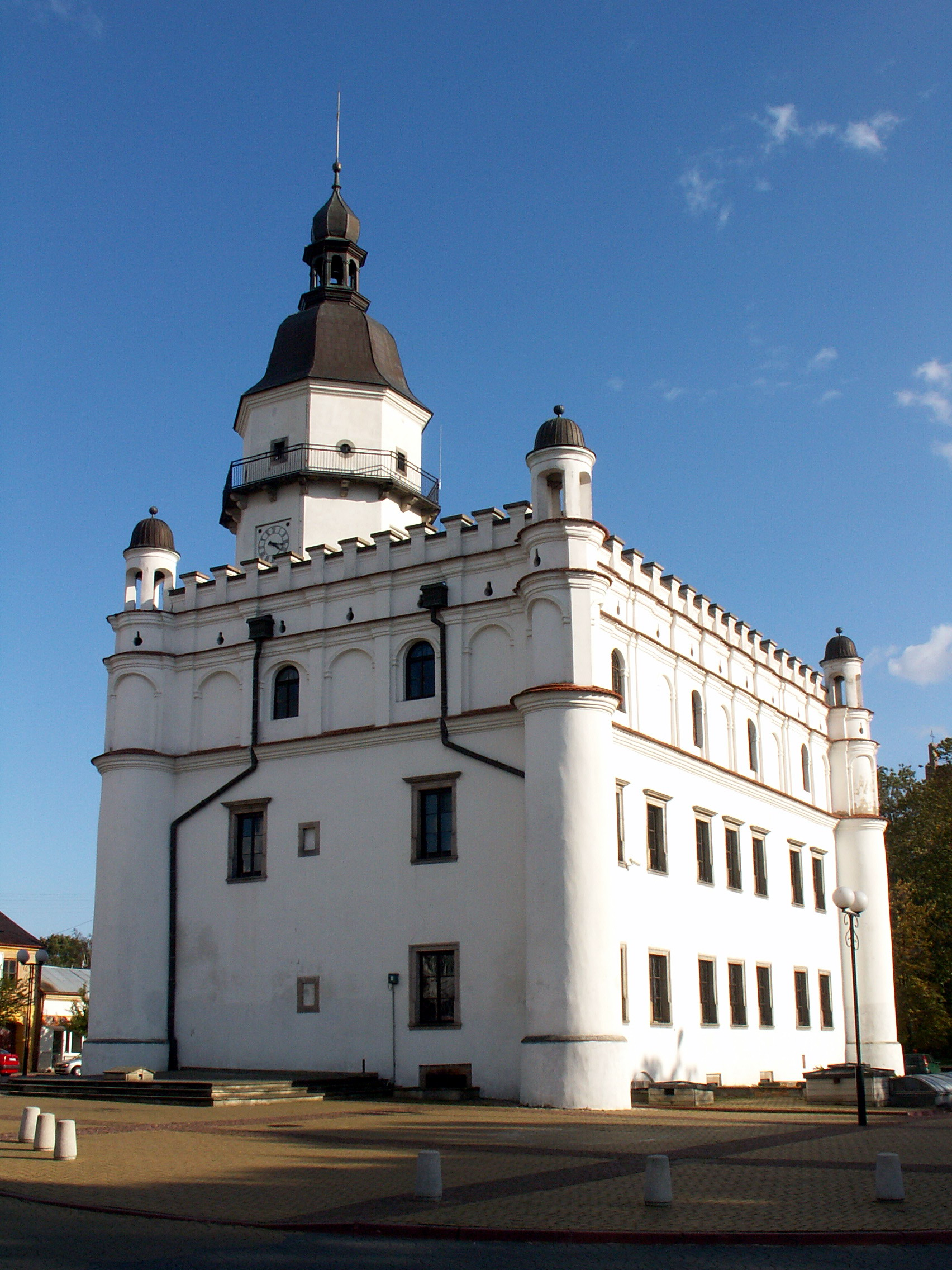 Ratusz w Szydłowcu. Budynek szkolny - LO w latach 1948-1960.